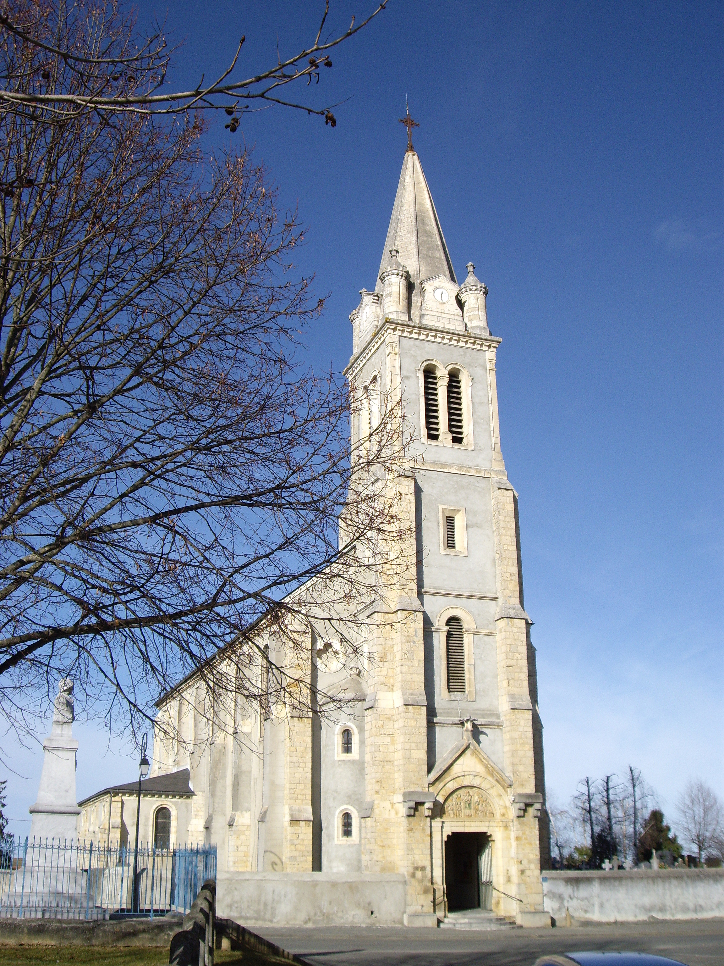 Église Saint-Barthélémy de Cieutat (65)